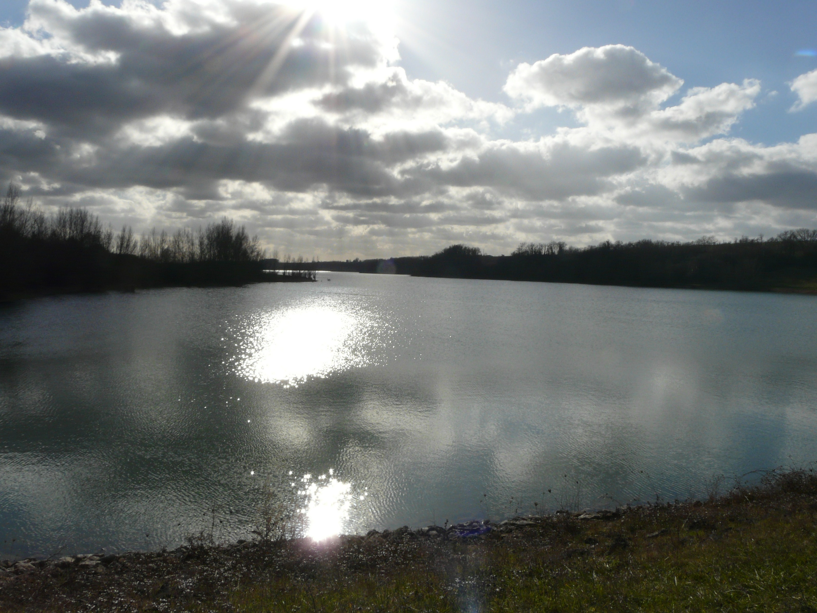 Le lac de l'Escourou en aval de la route départementale 25E, sépare Saint-Sulpice-d'Eymet (à gauche, Eymet, Dordogne) et Soumensac (Lot-et-Garonne, à droite).